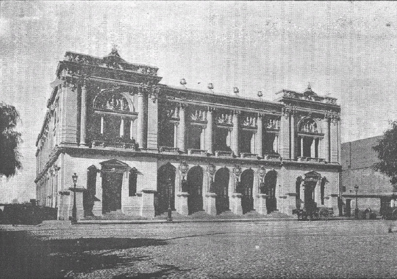 Teatro de la Victoria en Valparaíso. Inagurado el 15 de septiembre de 1886. Fue destruido por el terremoto de 1906.